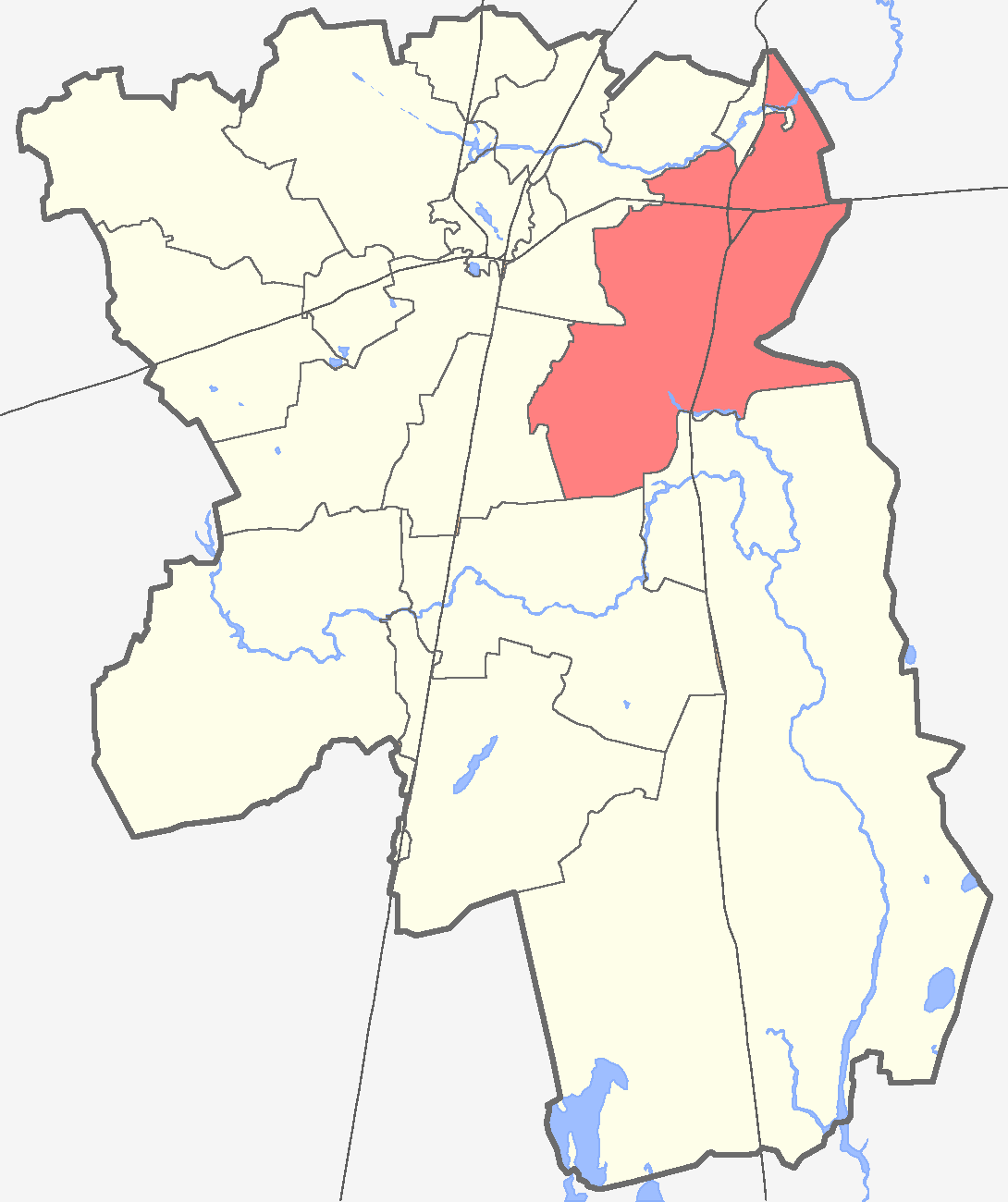 Сусанинское сельское поселение на карте Гатчинского района